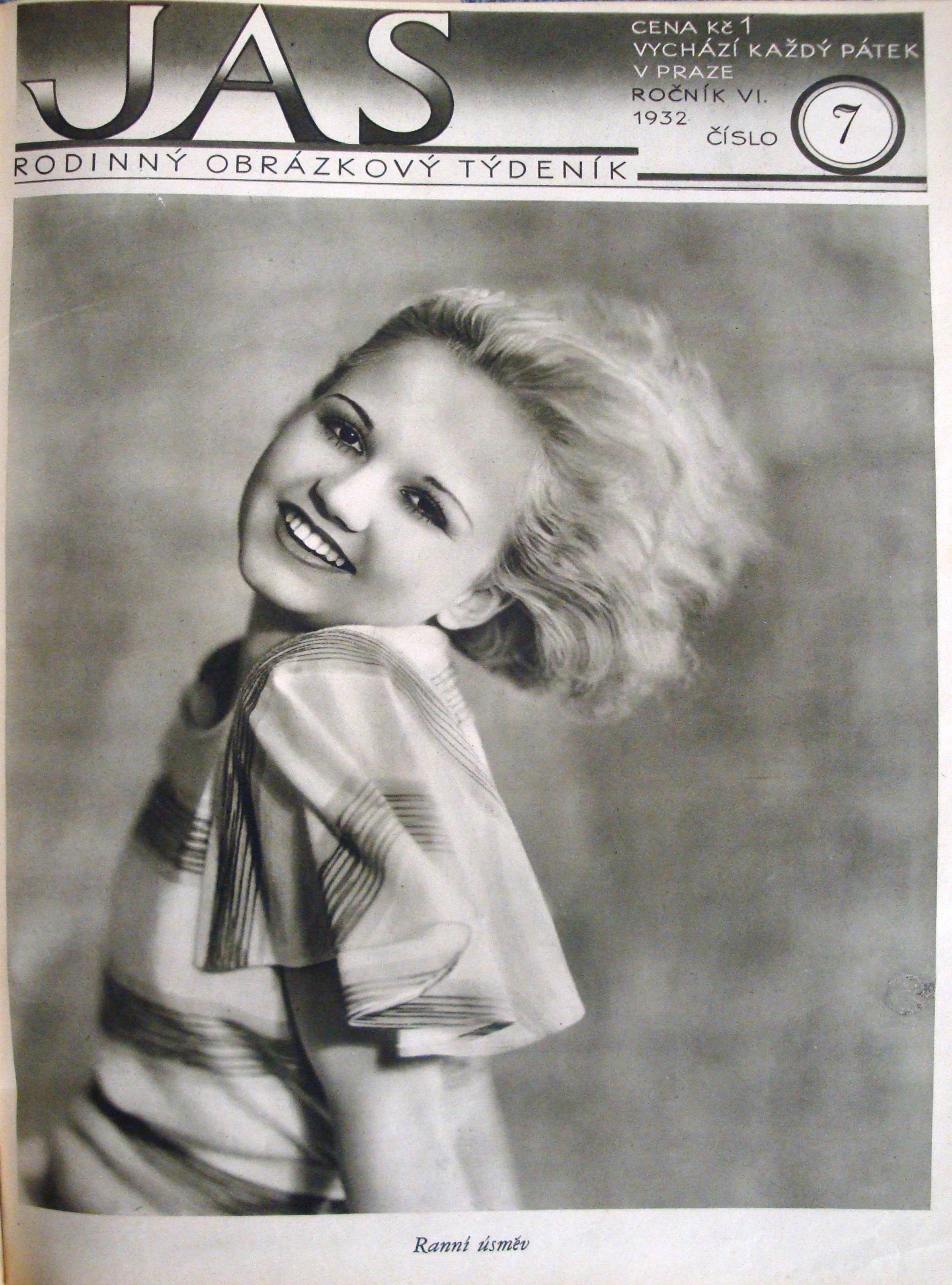 Jas 7/1932, titulní stránka